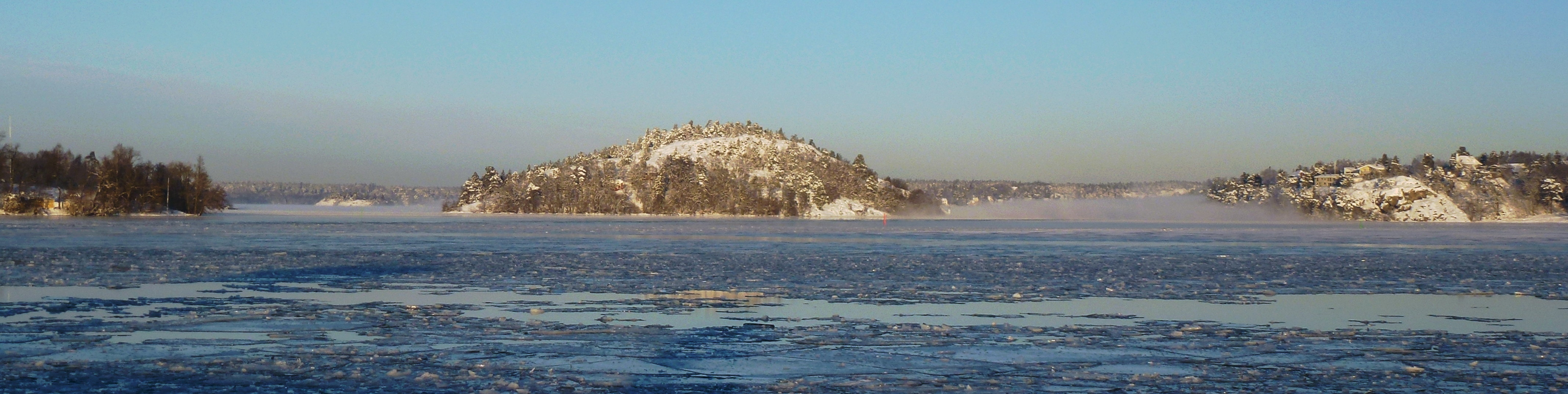 Panorama över Vårbyfjärden med Estbröte mitt i bild